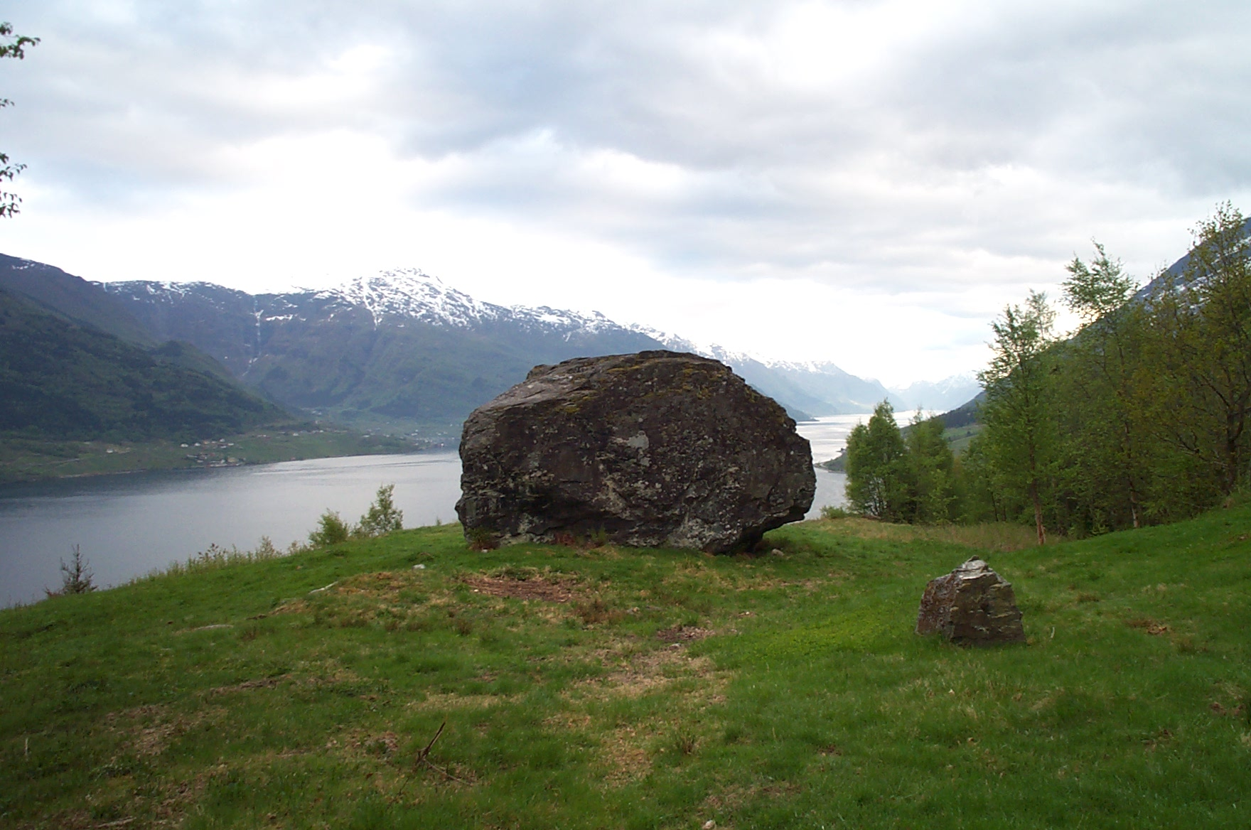 Håhaugsteinen